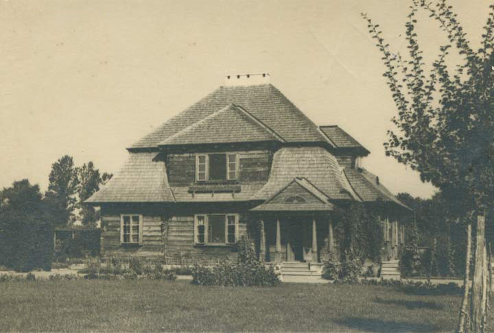 Беларуская (тарашкевіца): Галавічполе (Hałavičpole), сядзіба Іваноўскіх (Ivanoŭski)